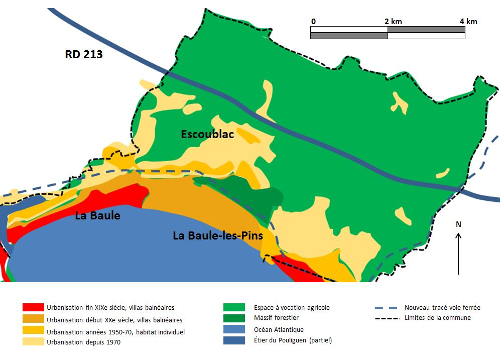 La Baule - Les grandes étapes de l'urbanisation